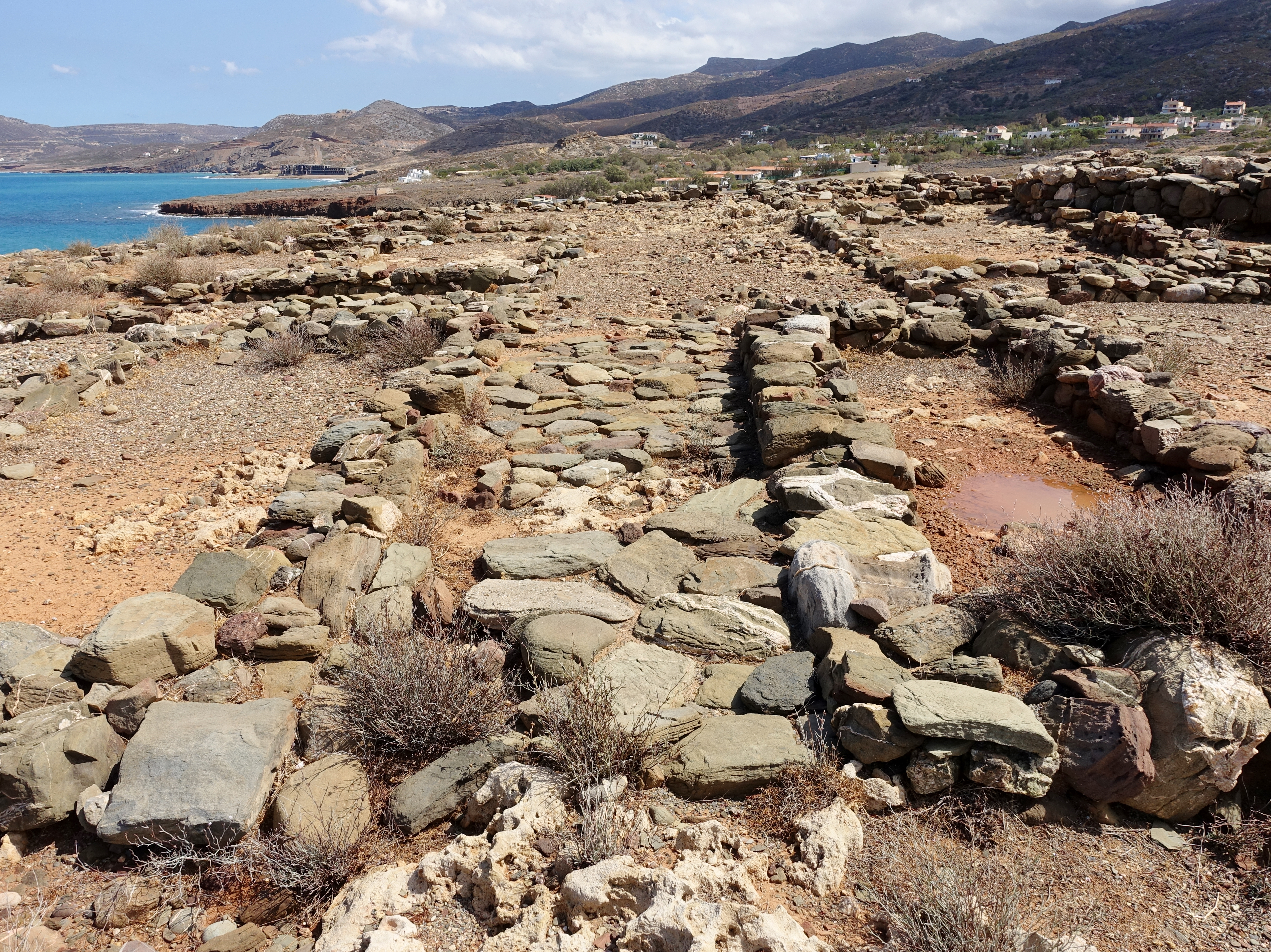 Minoisches Landhaus von Agia Photia (Αγία Φωτιά) aus der mittelminoischen Phase MM I A auf dem Hügel Koufota (Κουφοτά), Gemeinde Sitia, Kreta, Griechenland